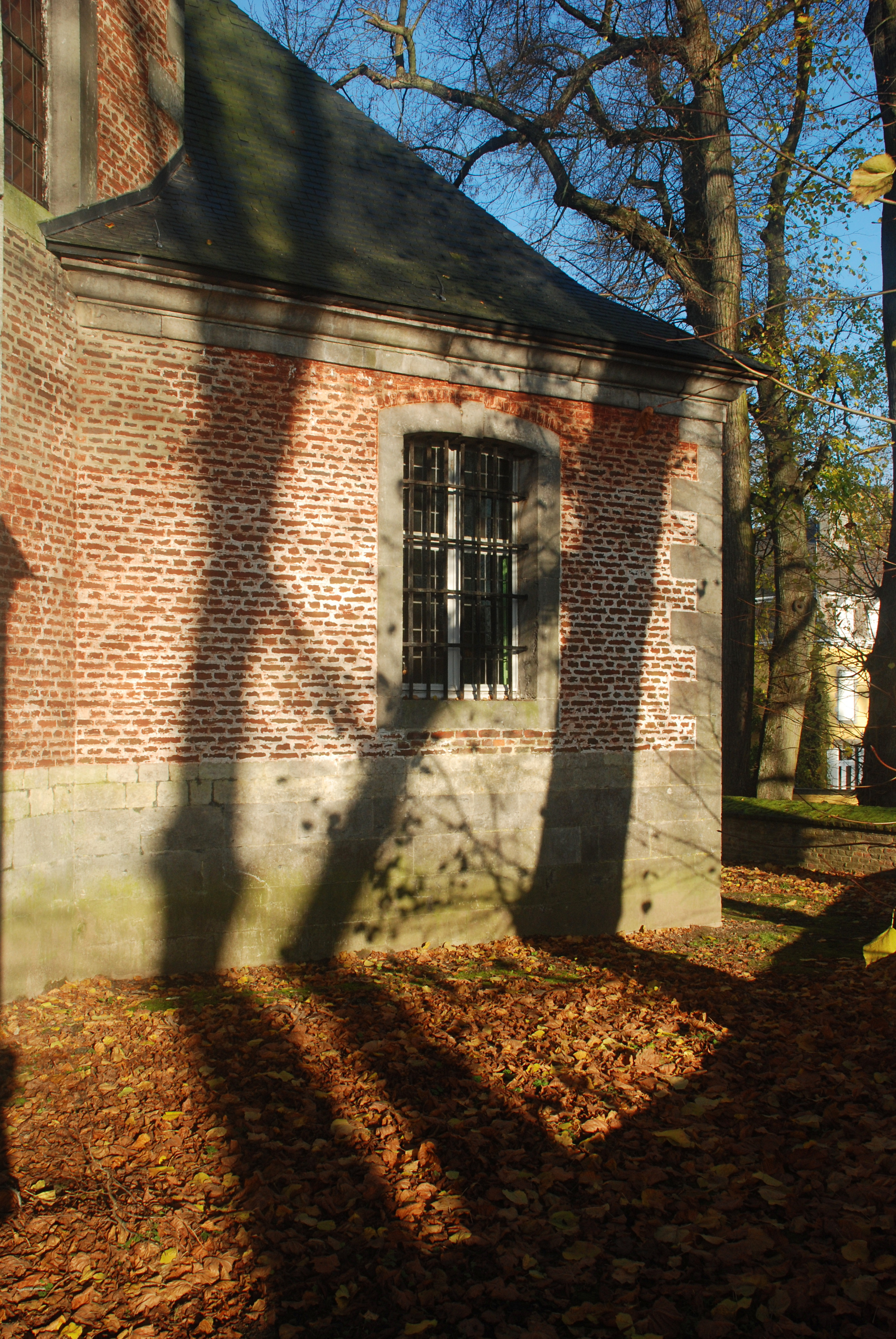 Belgique - Brabant wallon - Court-Saint-Étienne - Église Saint-Étienne